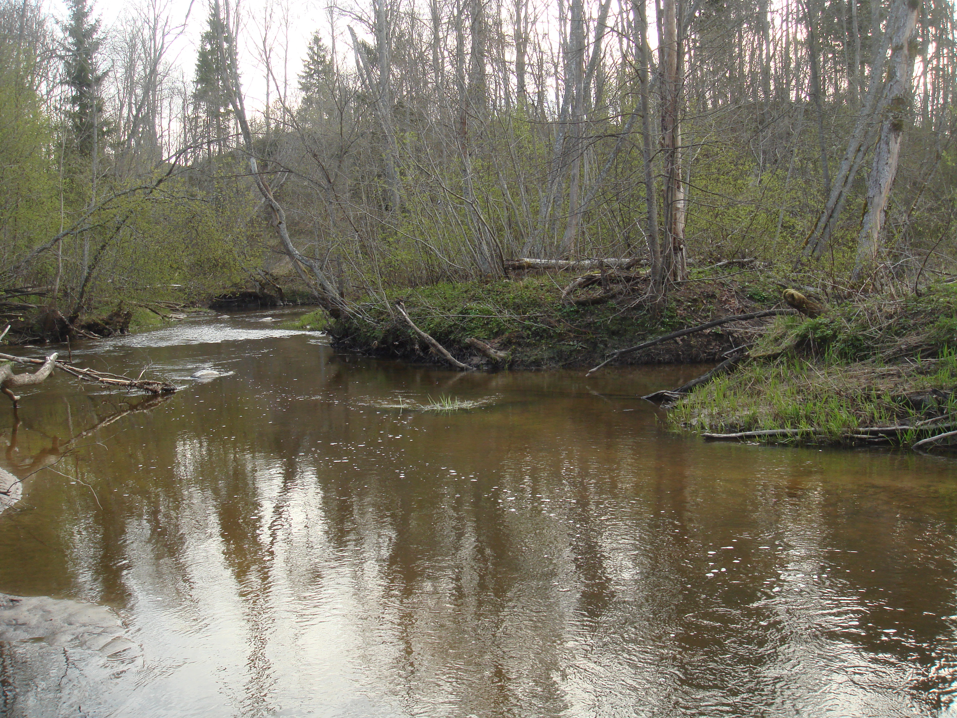 Kauliņupe flows in Ruņa